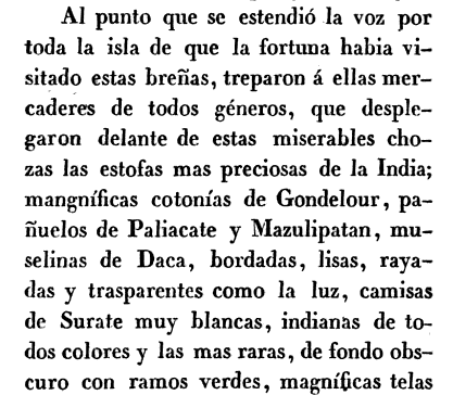 Párrafo donde hablan de diversas telas y prendas importadas desde la India.